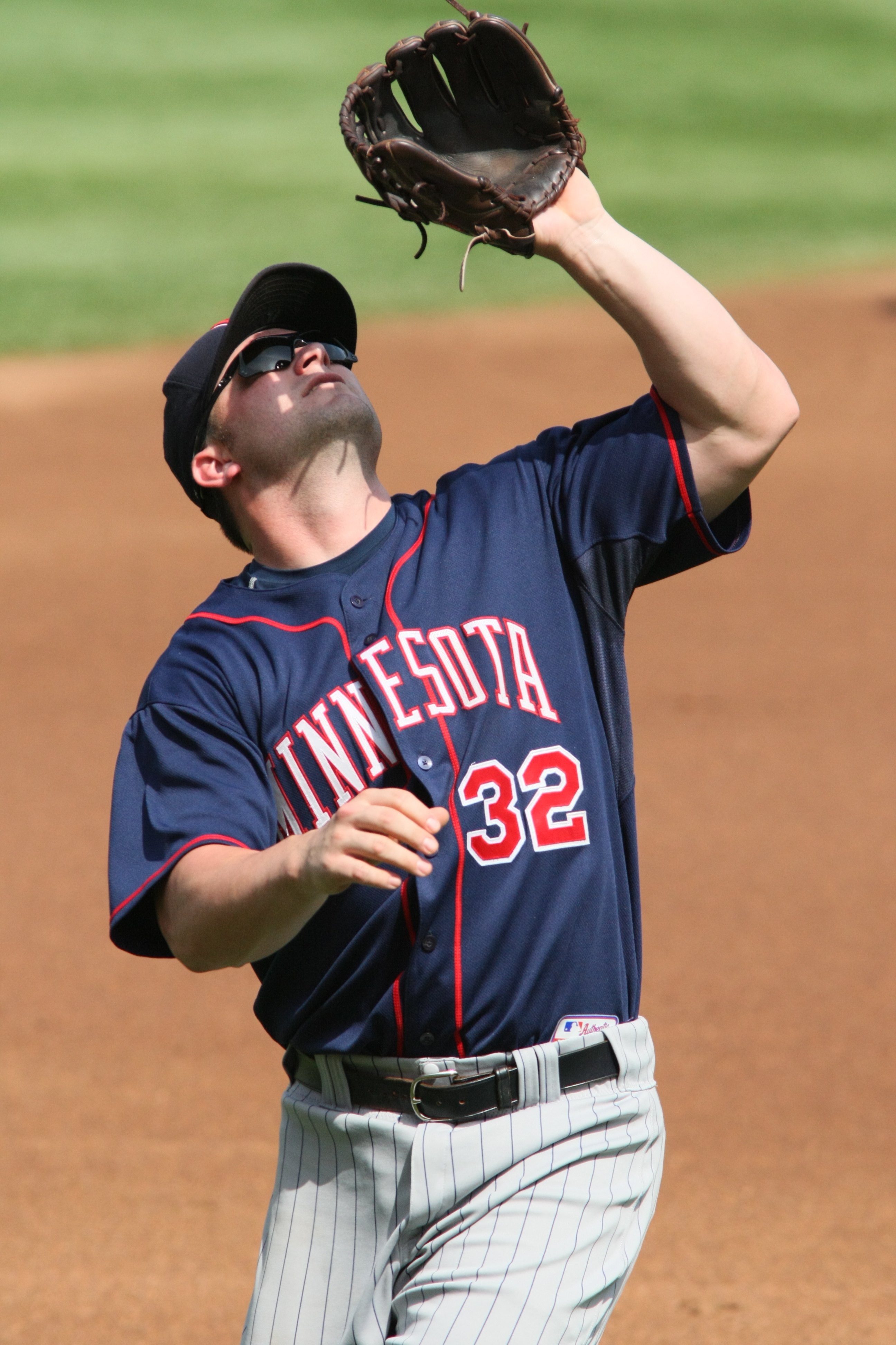 Brian Buscher